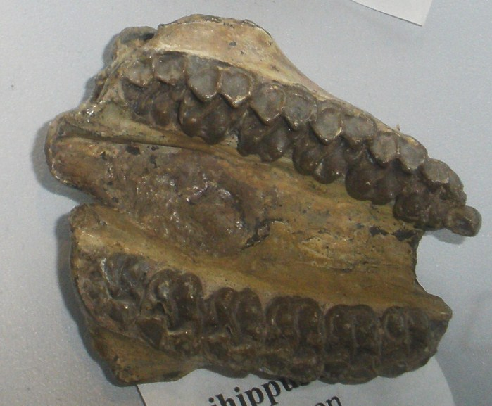 Fossil of Epihippus sp., an extinct horse- Took the photo at De Groene Poort, Boxtel